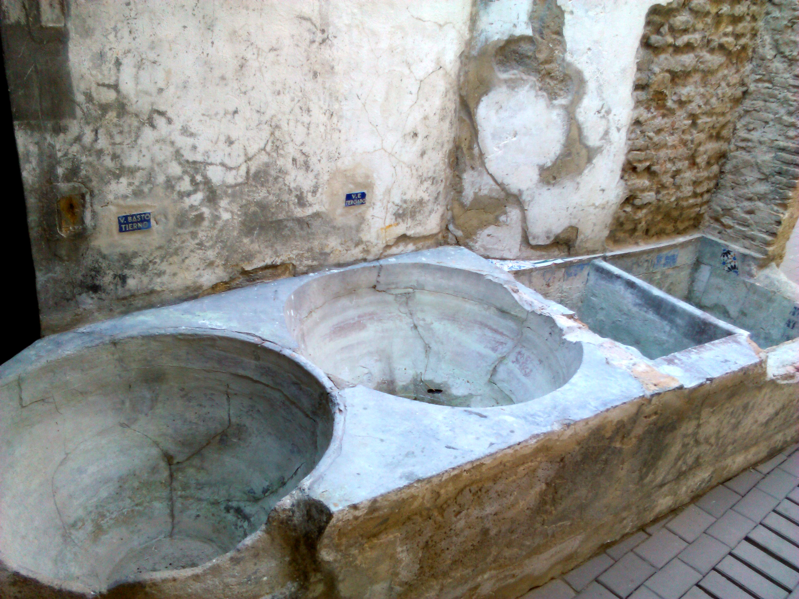 Museo de la Cerámica en Sevilla. Almágenas, depósitos para almacenar los pigmentos líquidos.